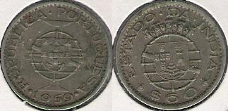 60 centavos 1959